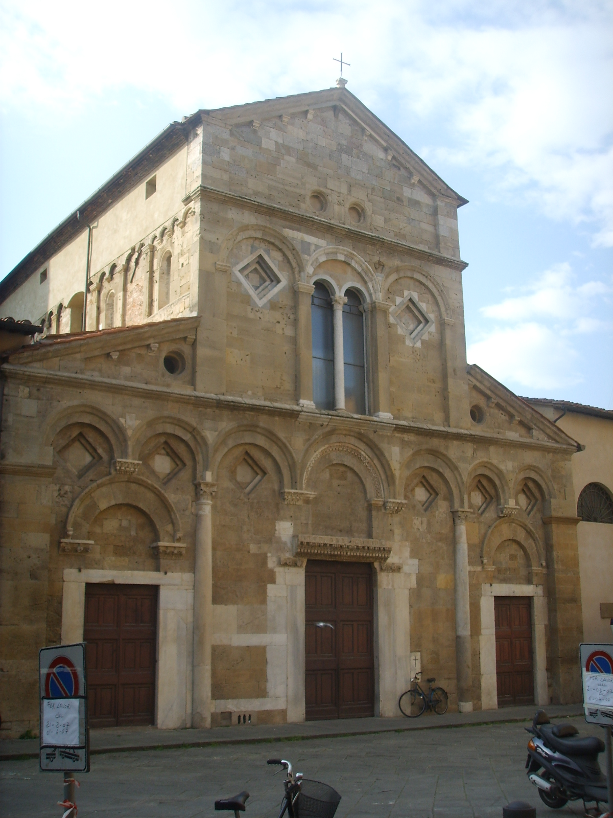 Campanile_chiesa_di_san_frediano